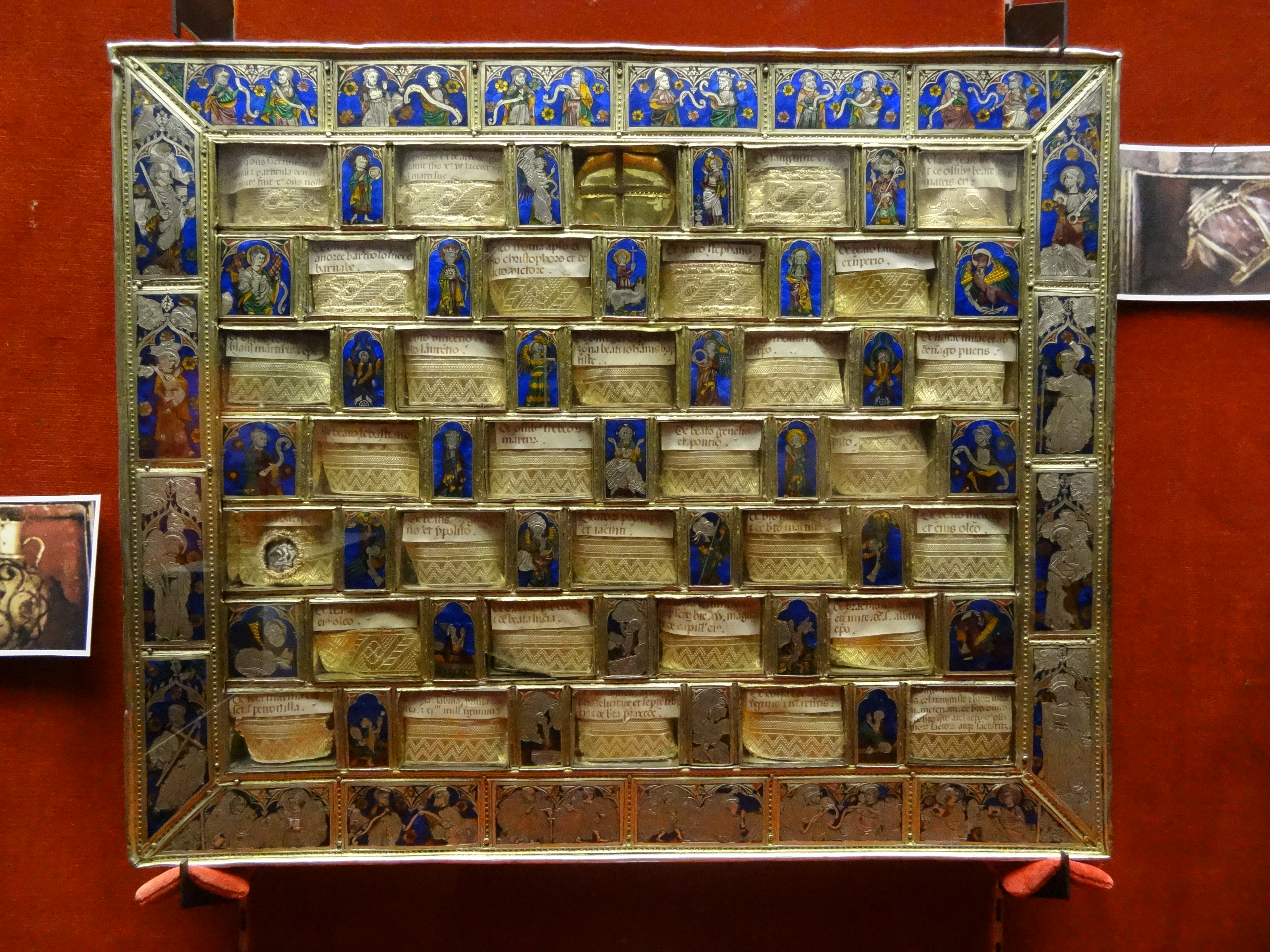 Ajedrez de Carlomagno, museo Roncesvalles